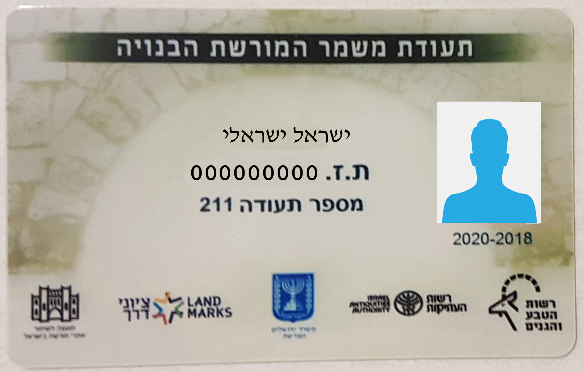 תעודת משמר מוכר